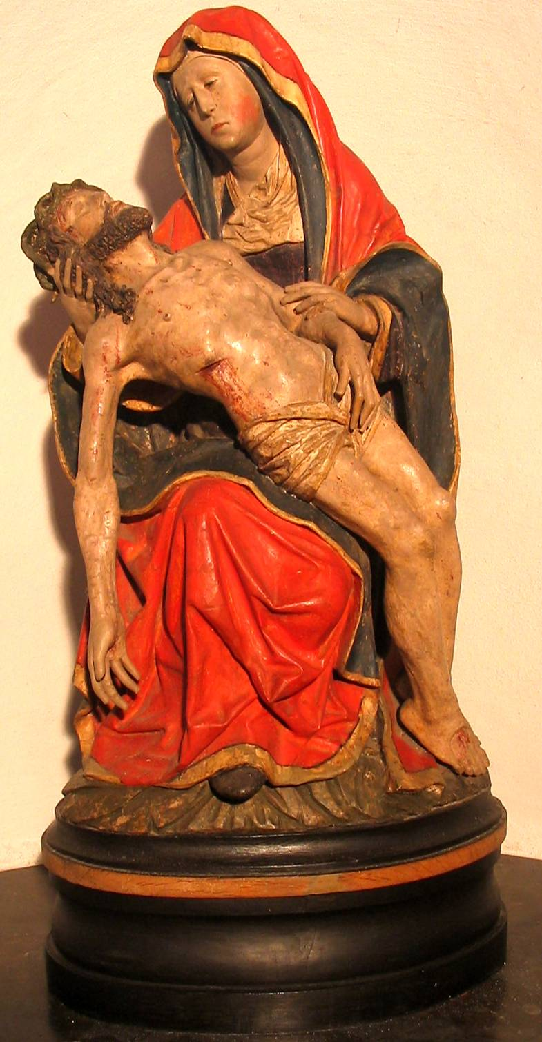 Ersdorfer Pietà, um 1600, Pfarrkirche Meckenheim-Ersdorf, Erzbistum Köln